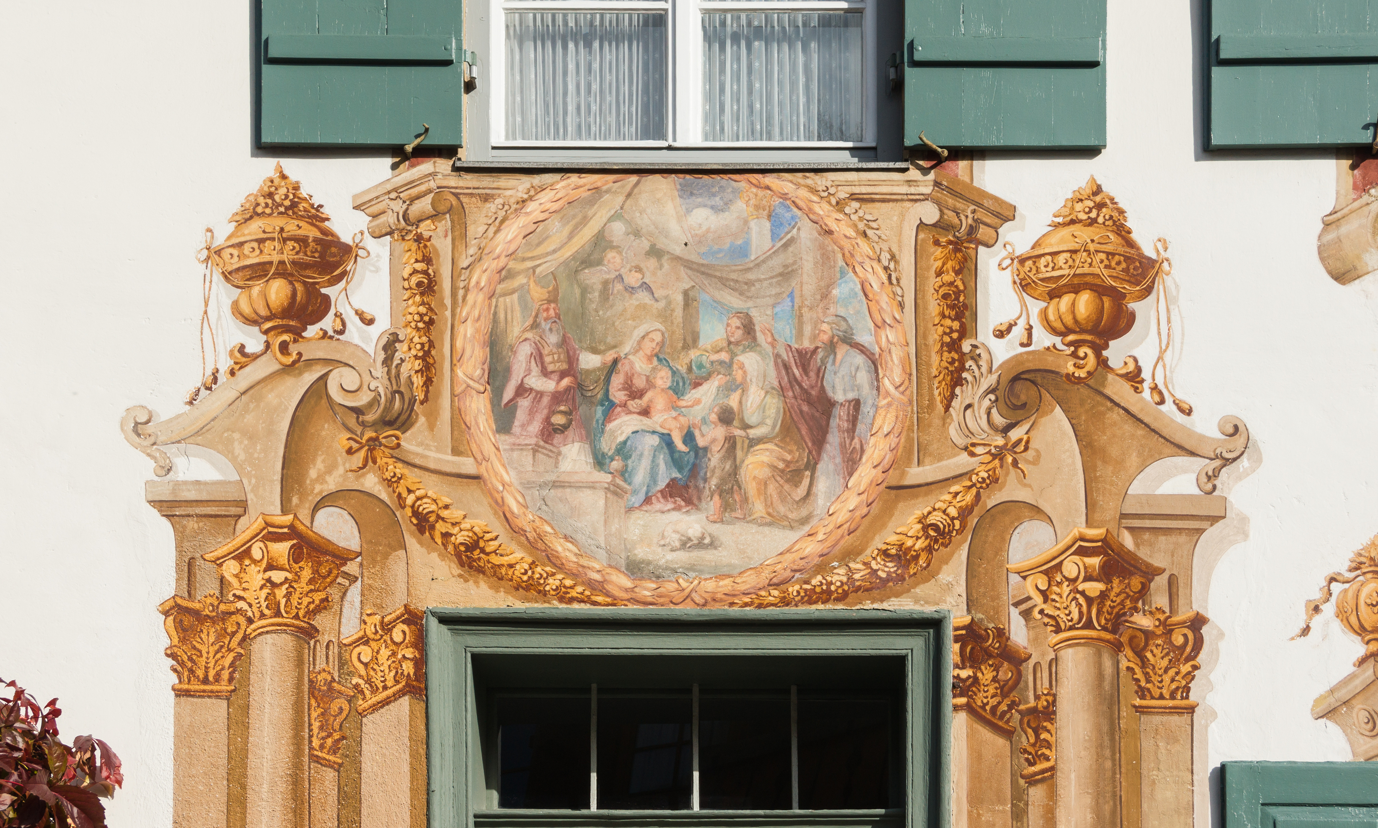 Décoration murale, rencontre entre la Vierge Marie, Sainte Elisabeth, et les deux cousins Jésus et Saint Jean-Baptiste, enfants.